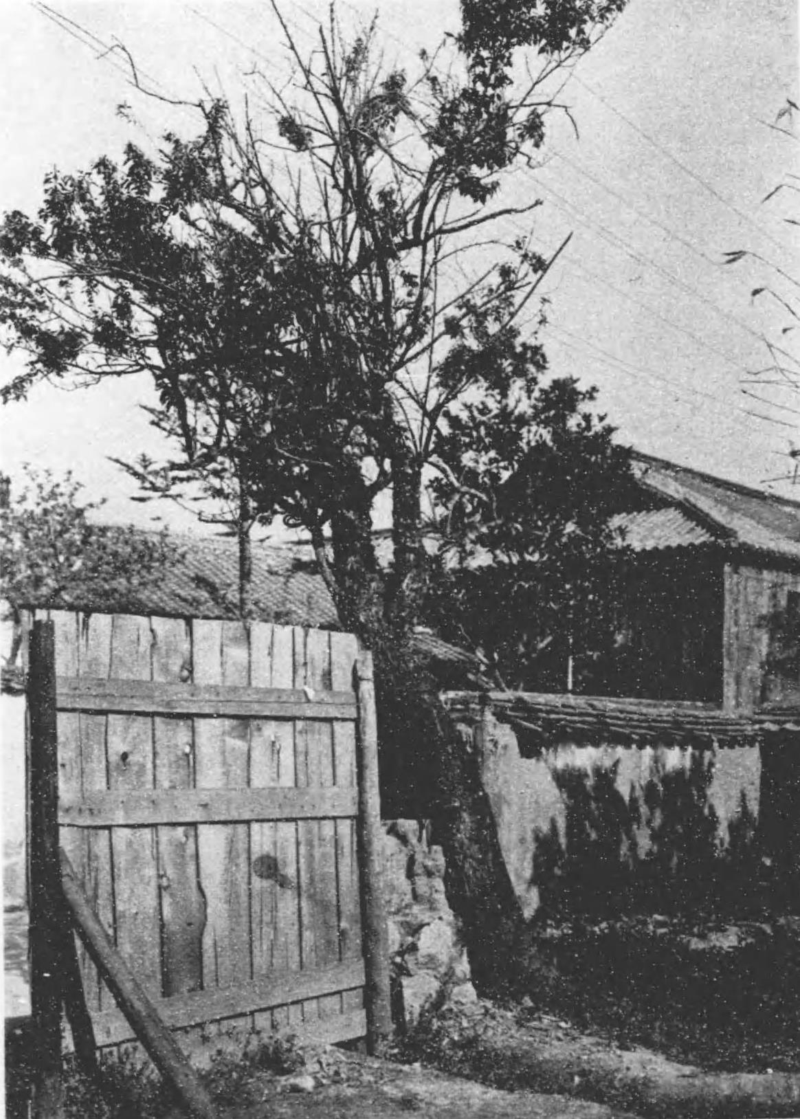 三吉米熊家の趾